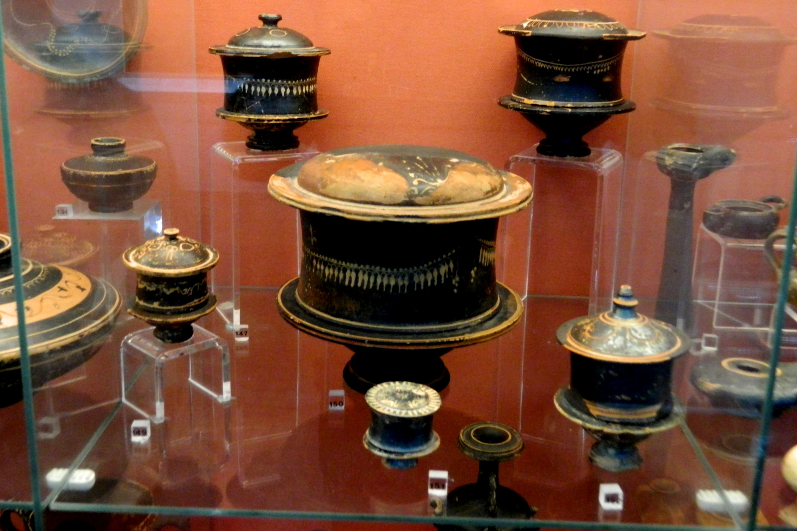 Ceramiczne pudełka - dla Greków są to πυξίδες (piksides) - w Grecji starożytnej używane do przechowywania kosztowności. Mogą nieco różnić się kształtem. IV i III wiek p.n.e. - przykład płaskorzeźby. Obecnie eksponaty w Okręgowym Muzeum Archeologicznym w Lamii, Grecja